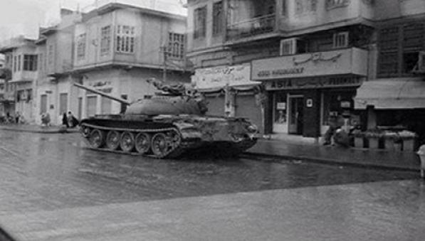 1963 دبابة عراقية في منطقة البتاويين اثناء انقلاب